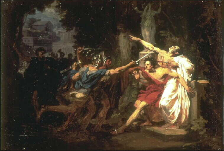 La morte di Caio Gracco, olio su tela, 37.7 x 53.4, Valenciennes, musée des Beaux-Arts